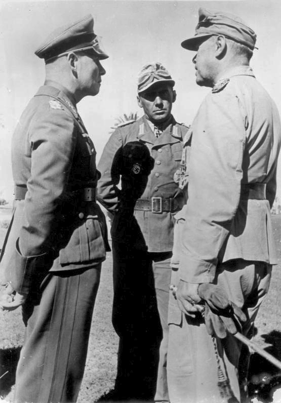 Bild Nr. 464 Generalfeldmarschall Rommel im Gespräch mit Generalfeldmarschall Kesselring Berlin, den 4.2.1943 [Herausgabedatum]